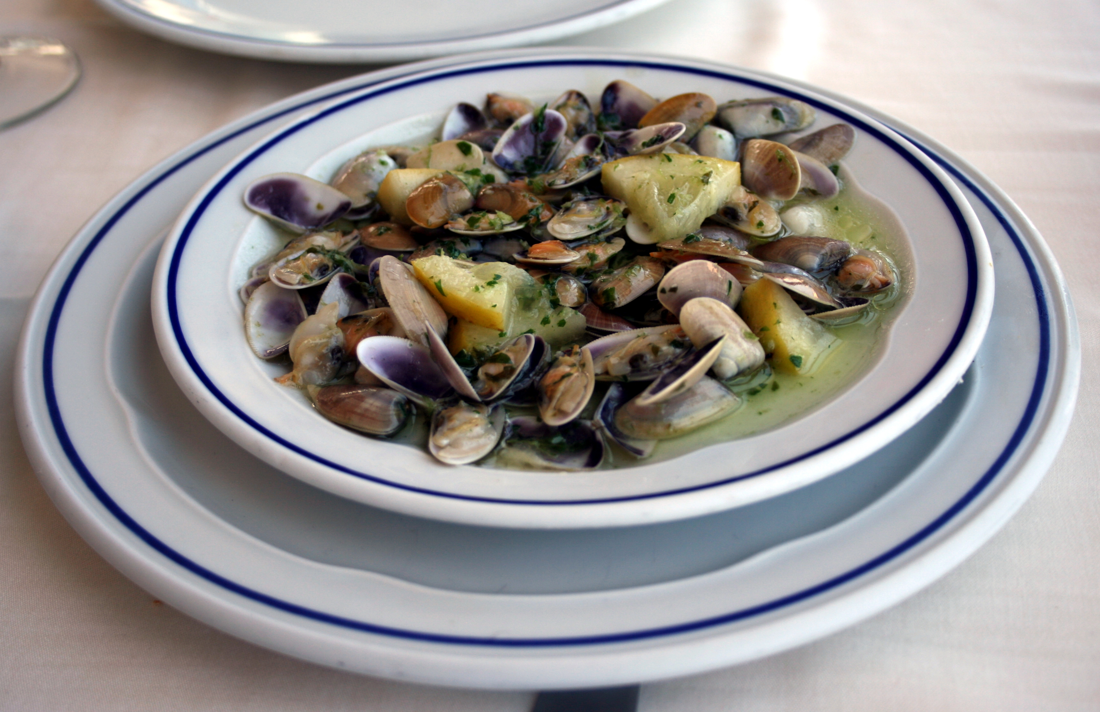 Tellinas